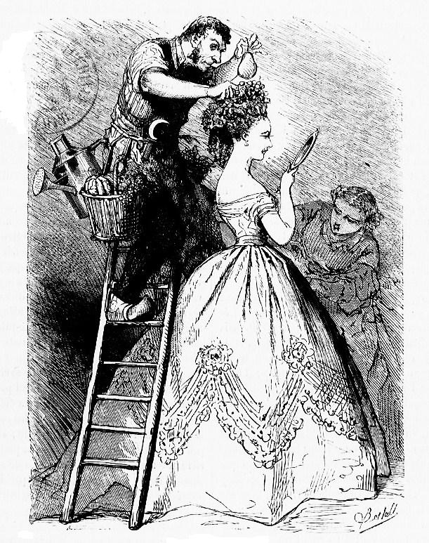 Préparatifs pour la Mi-Carême à Paris.